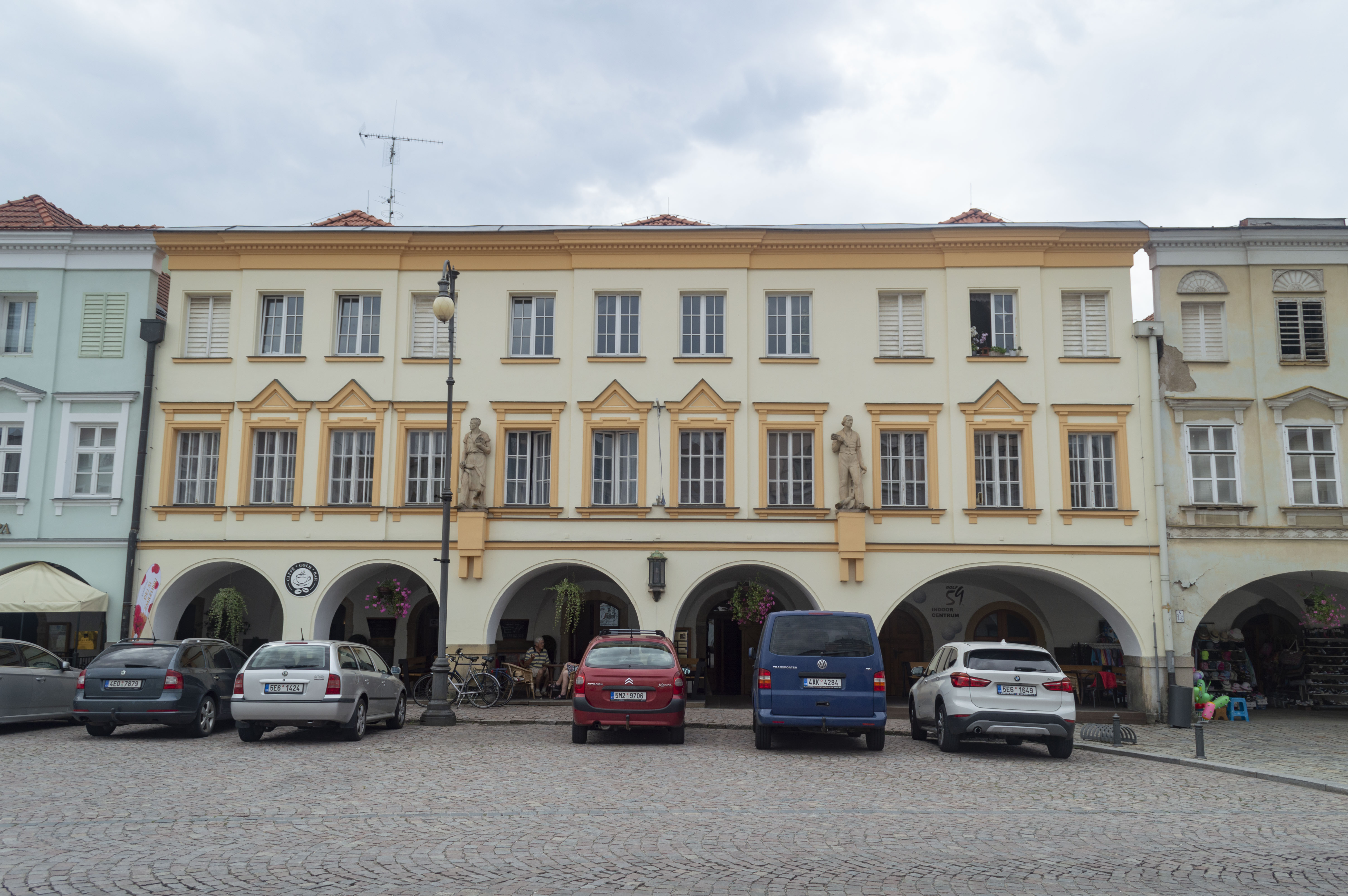 Litomyšl - Smetanovo náměstí čp. 57, 58 a 59